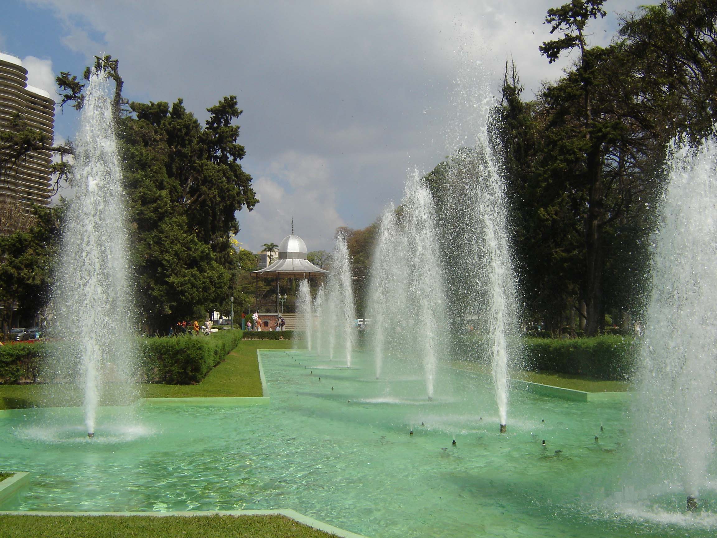 Praça da Liberdade, Belo Horizonte, Minas Gerais, Brasil.